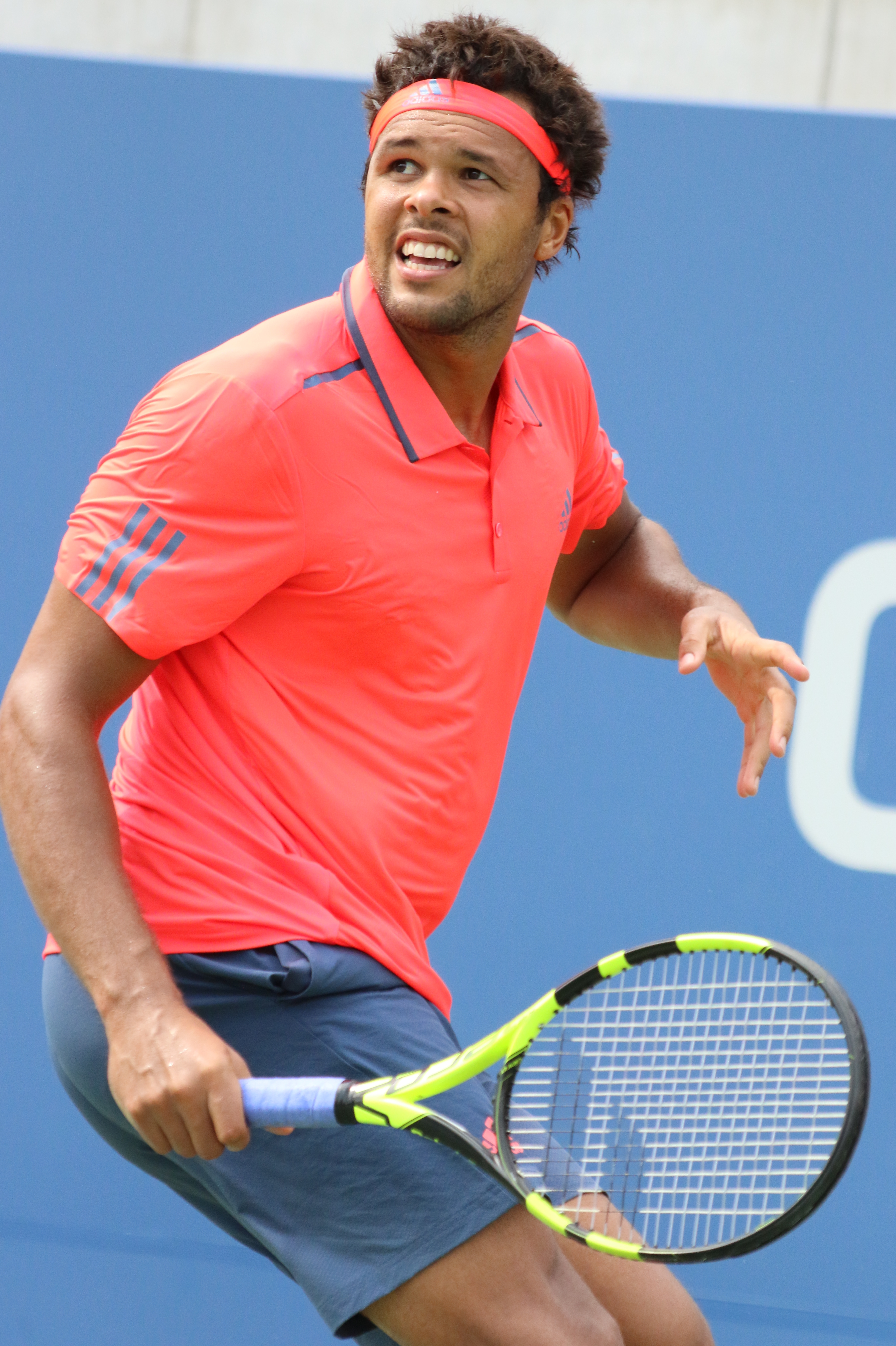 Tsonga US16 (75)